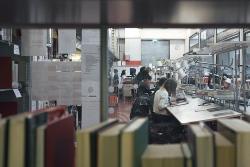 Hauptlesesaal der Universitätsbibliothek der Universität für angewandte Kunst Wien